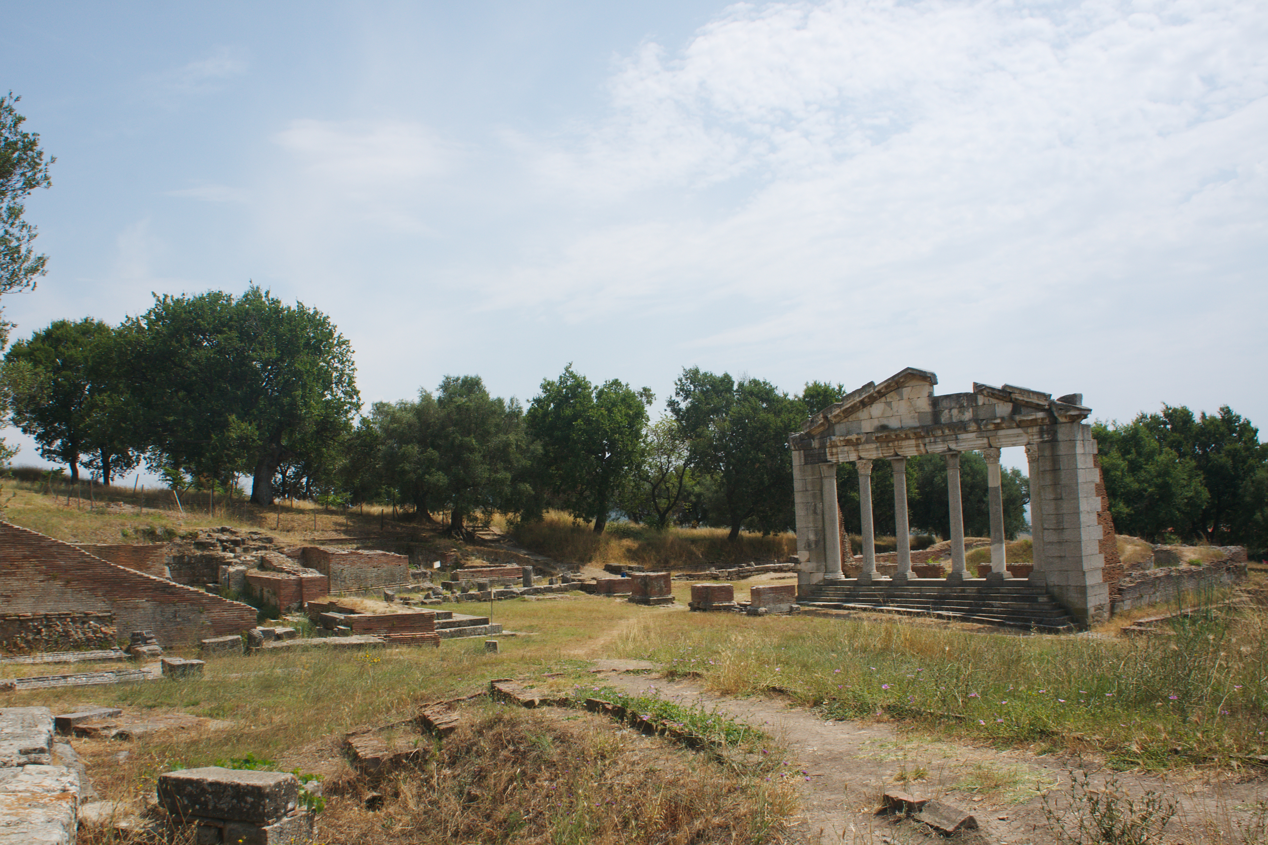 Site Archéologique d'Apollonie d'Illyrie (Appolonia) en Albanie.